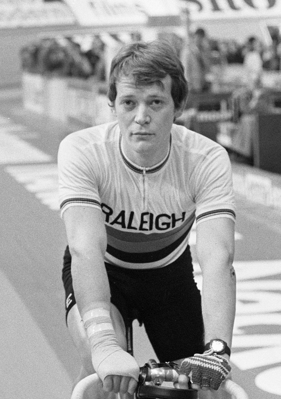 Wielerzesdaagse in Ahoyhal, Rotterdam; wielrenner René Pijnen.